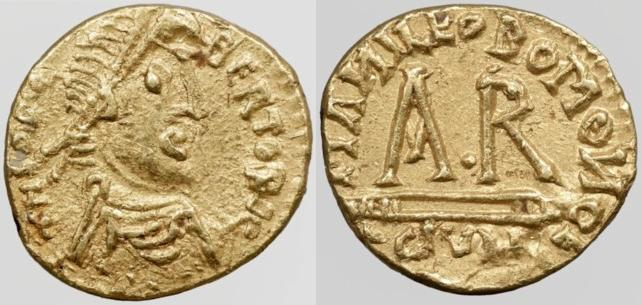 Tiers de sou de Théodebert II frappé à Clermont (595-612). BNF, monnaies, médailles et antiques. Avers : Buste drapé et diadémé à droite. Revers : A R dans le champ.